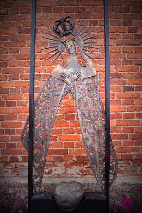 Беларуская (тарашкевіца): Усьпенскі касьцёл. г. Мёры This is a photo of Belarusian heritage monument. Reference number: 213Г000551 ( WLM)